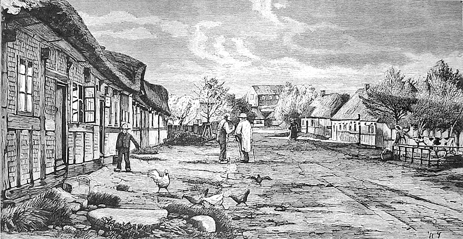 Gammel Rye ved Silkeborg i 2. halvdel af 1800-tallet